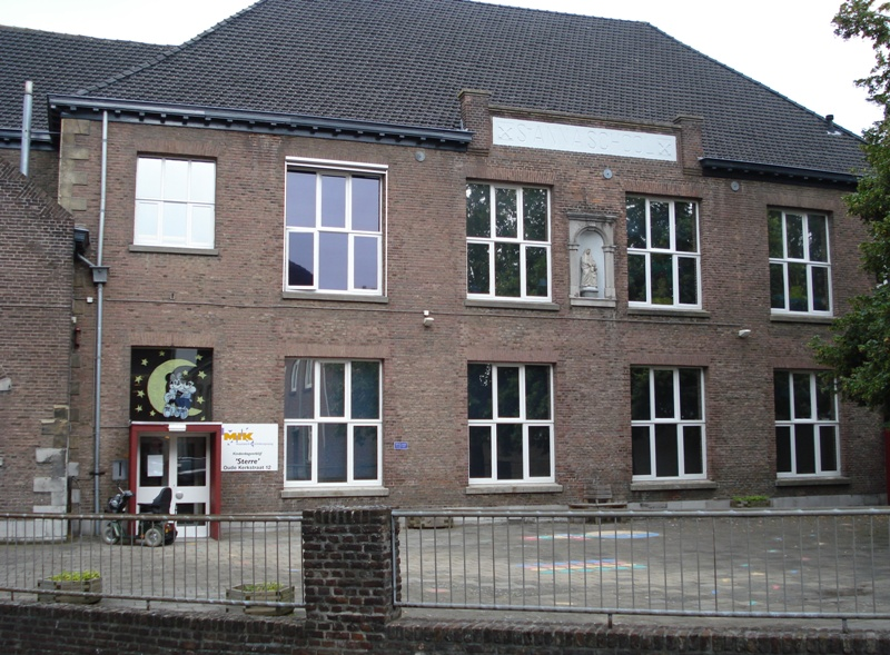 Rijksmonument 28059 - Oude Kerkstraat 12, Maastricht (Heer)